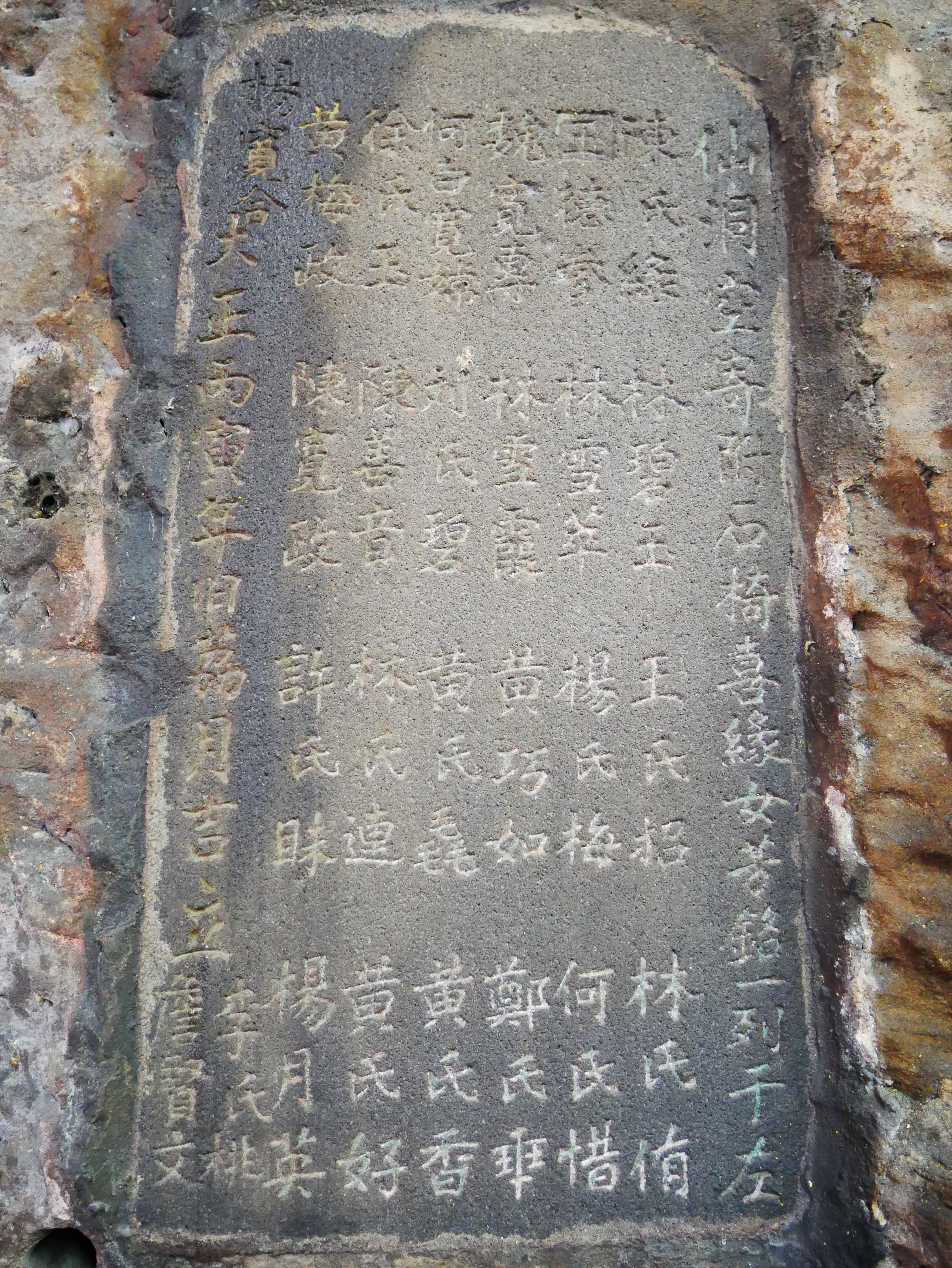 仙洞空寄付石椅喜緣女芳名碑記，大正丙寅年旧荔月（大正十五年，西元1926年農曆六月）吉立。照片拍攝於基隆市中山區仙洞里仙洞巖